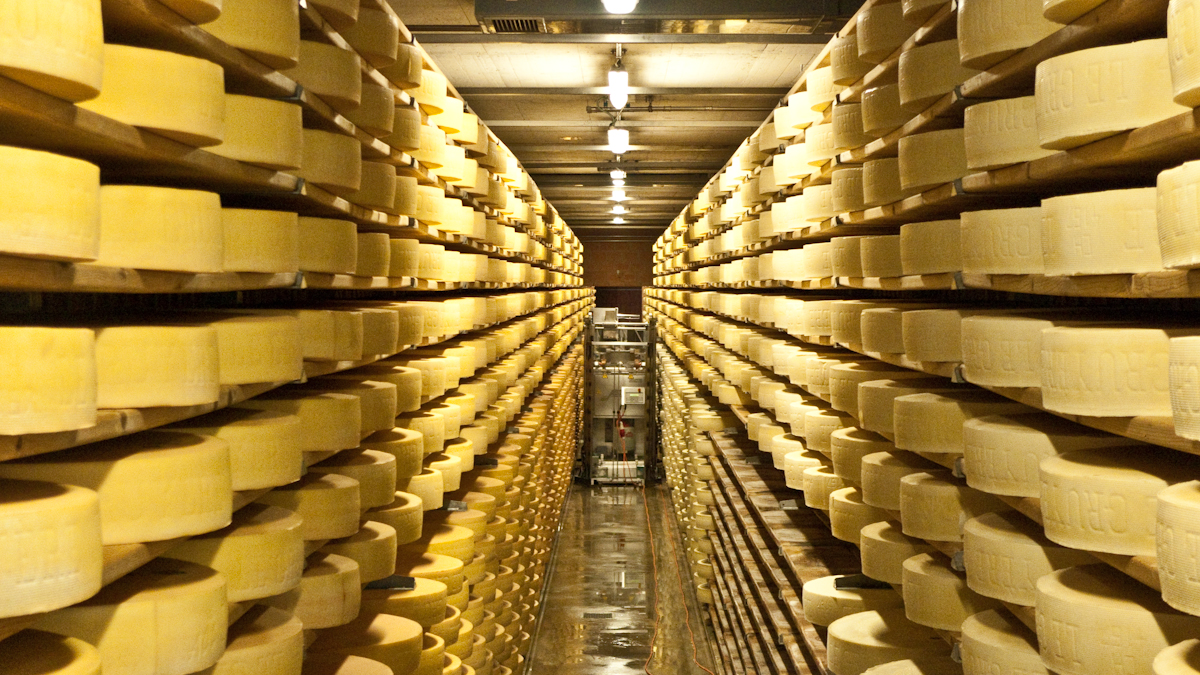 Gruyères-32